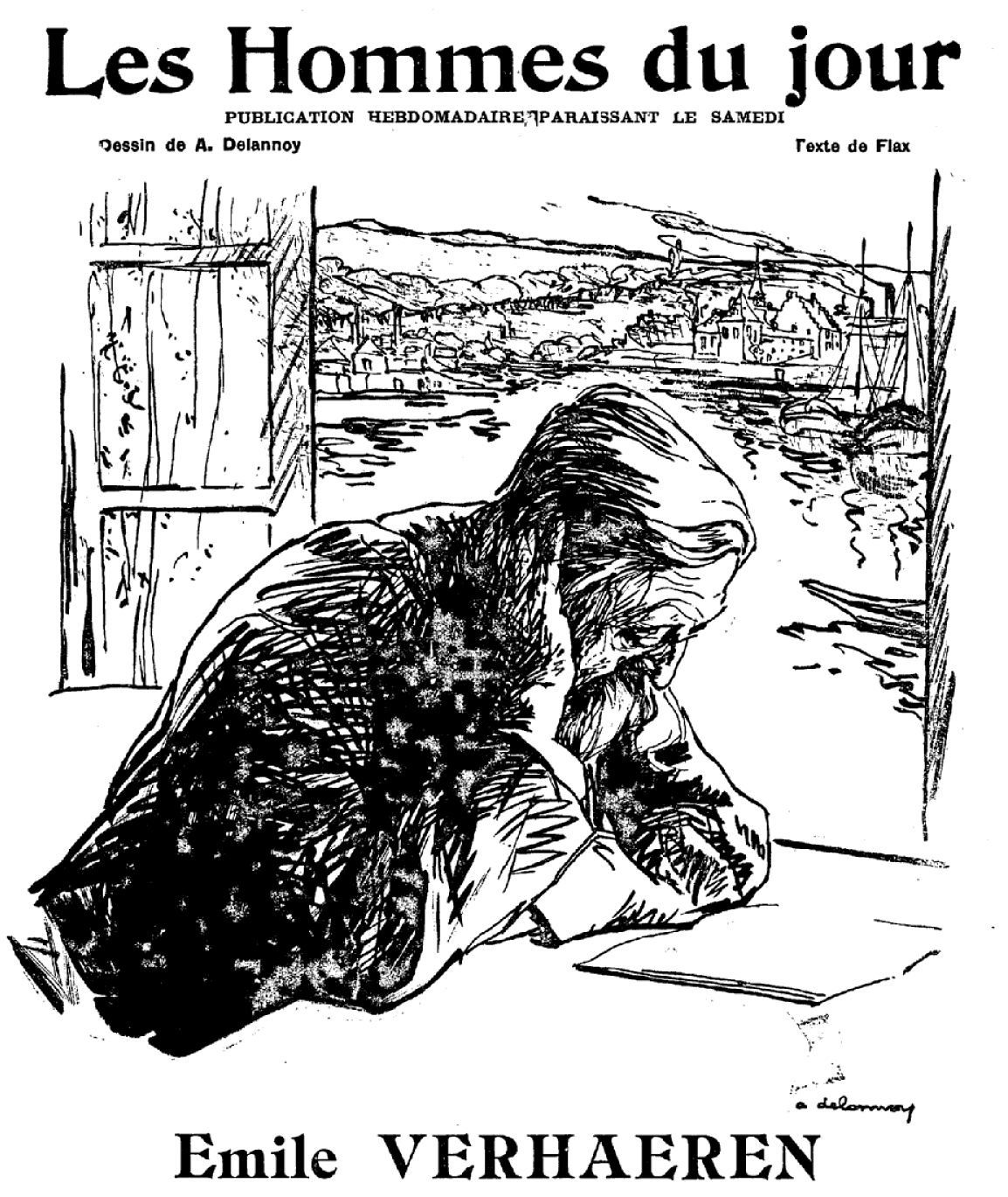 Flax, Émile Verhaeren, illustration Aristide Delannoy, Les Hommes du jour, n°82, 14 août 1909.